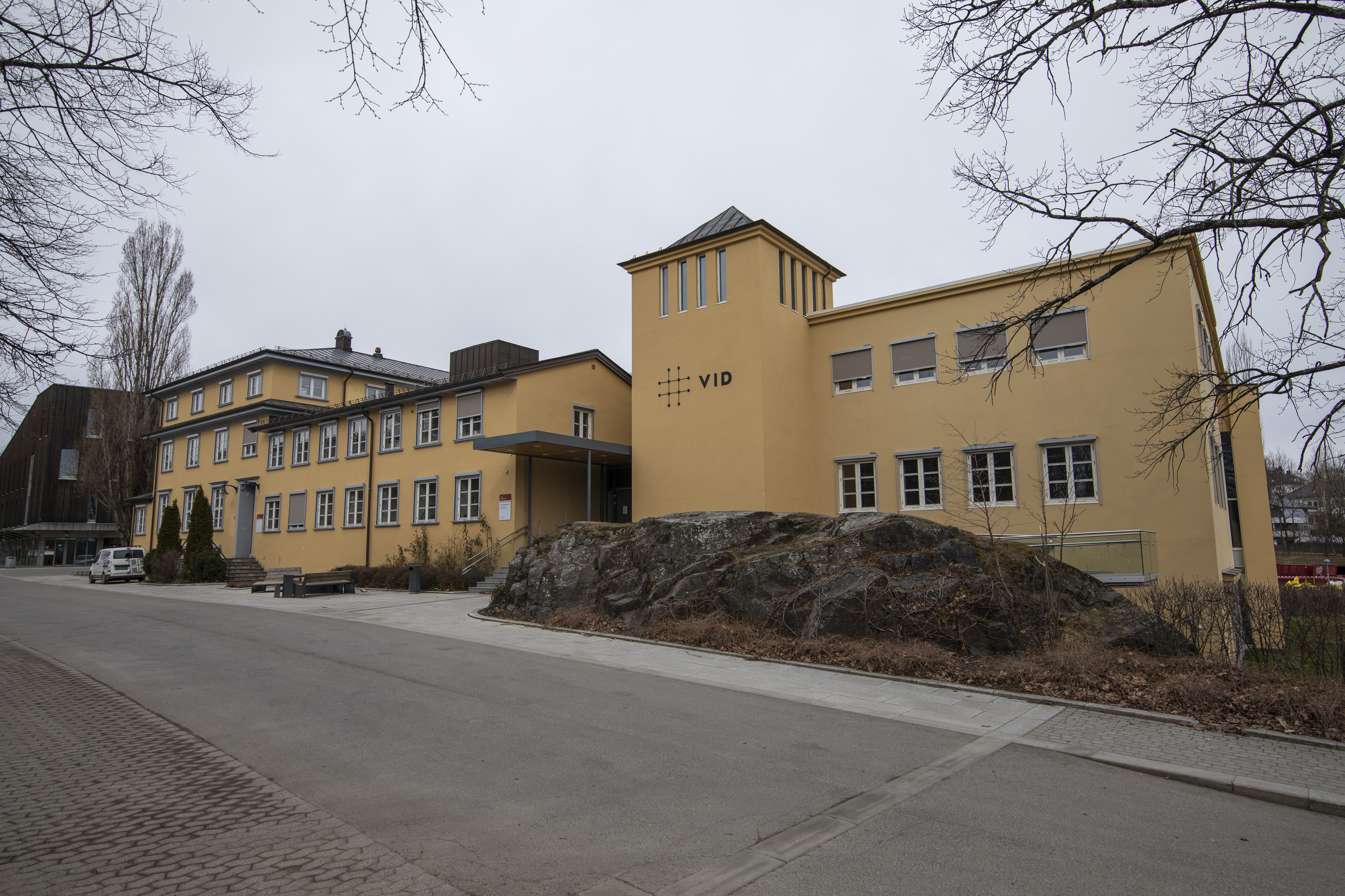 VID Oslo, studiested Diakonhjemmet i Diakonveien.